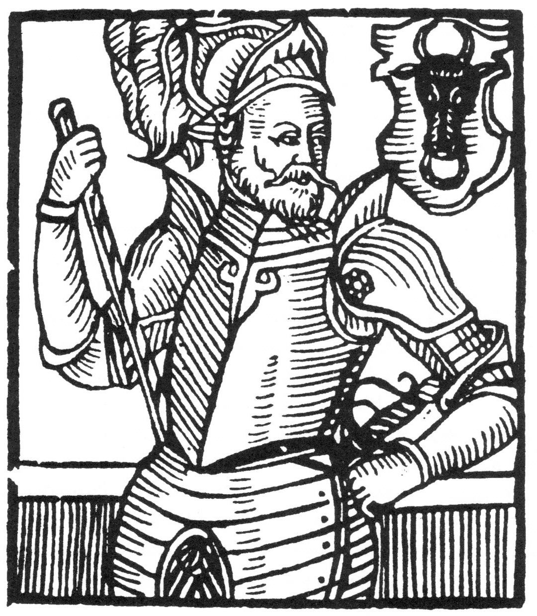 Jan z Pernštejna +1475